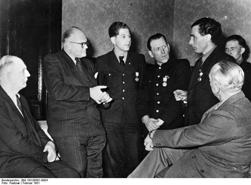 Halle, Verkehrskonferenz Illus/Paalzow 6.2.51 Die zweite deutsche Verkehrskonferenz fand vom 2. - 4.2.51 in Halle in Anwesenheit von Minister für Arbeit Roman Chwalek, Minister für Verkehr Prof. Dr. Reingruber und Staatsekretär Wollweber statt. U.B.z.: V.l.n.r.: Nationalpreisträger Wendler, Staatssekretär Wächter, Held der Arbeit Laake, Held der Arbeit Schneider und Minister Reingruber diskutieren über die Fünfhunderterbewegung. Abgebildete Personen: Fritsche, Karl: Lokomotivführer, Held der Arbeit 1950, DDR Reingruber, Hans Prof. Dr. Ing.: Minister für Verkehrswesen, DDR (PND 133624501)